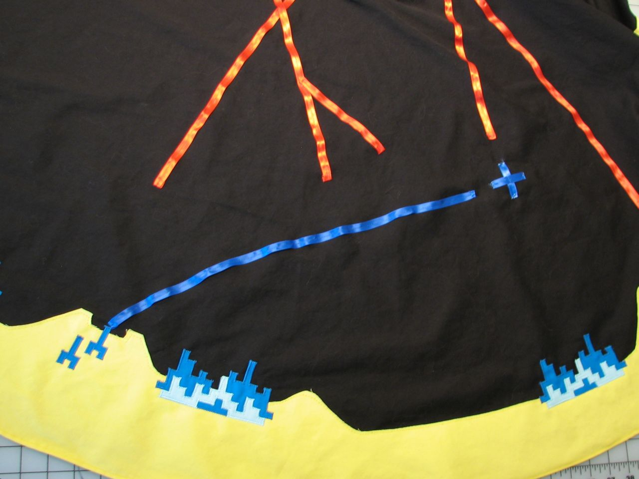 Missile Command Skirt